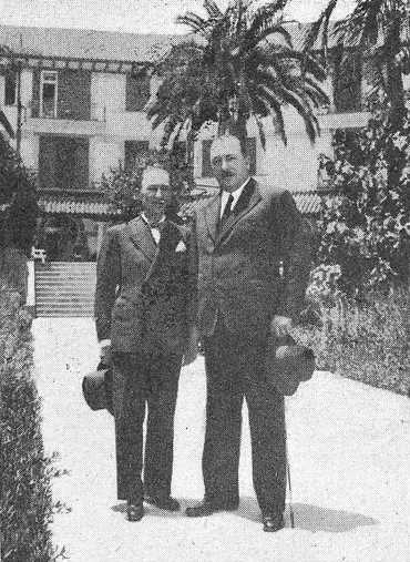 Ramón Fernández Mato e José Calviño Domínguez no parque do Hotel Cristina, fotografía en Vida Gallega 1933